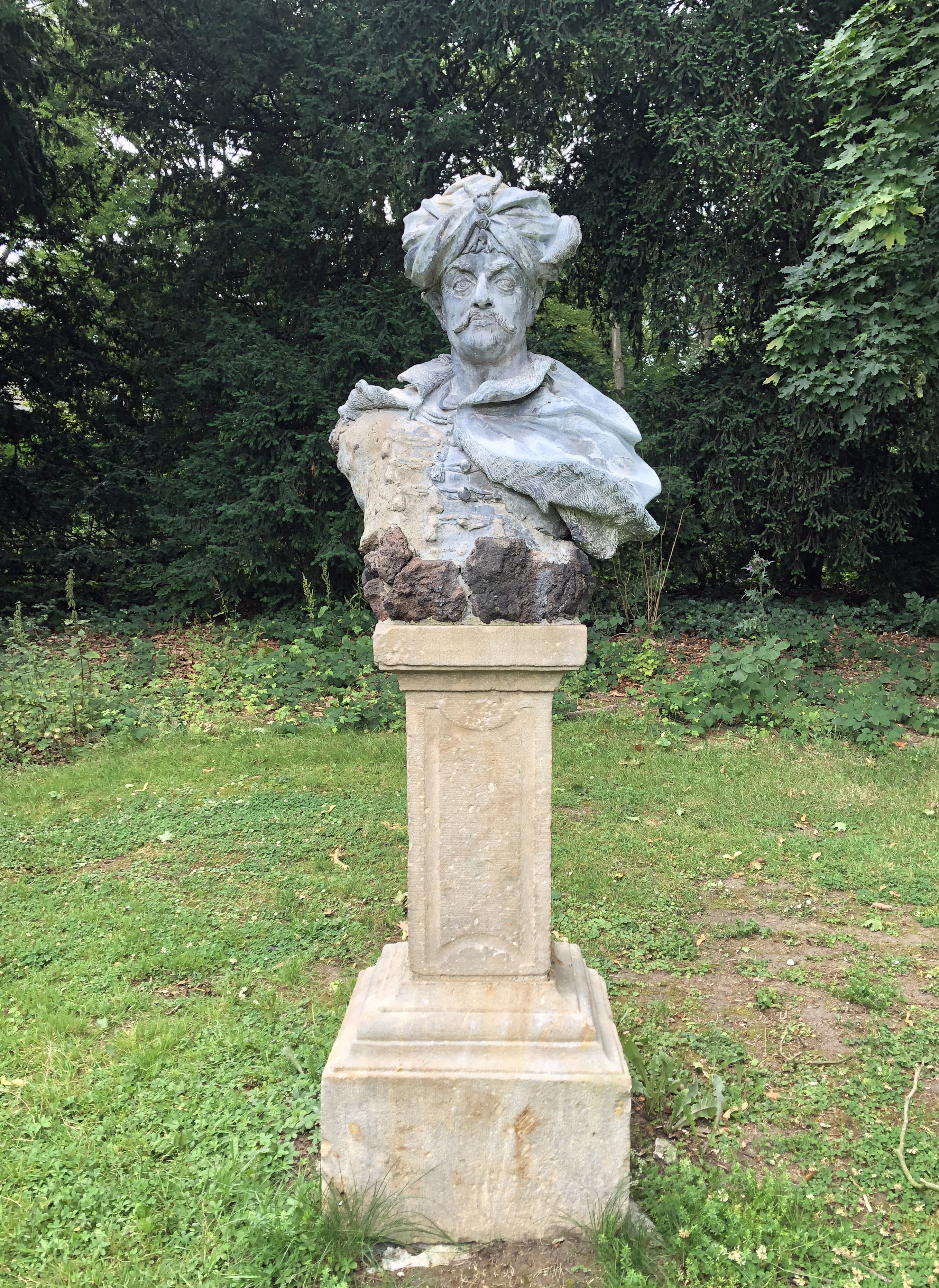 Großwesir Büste aus Hartbleiguss aufgestellt auf der Rasenfläche an der Südseite des Herrenhauses Lantz